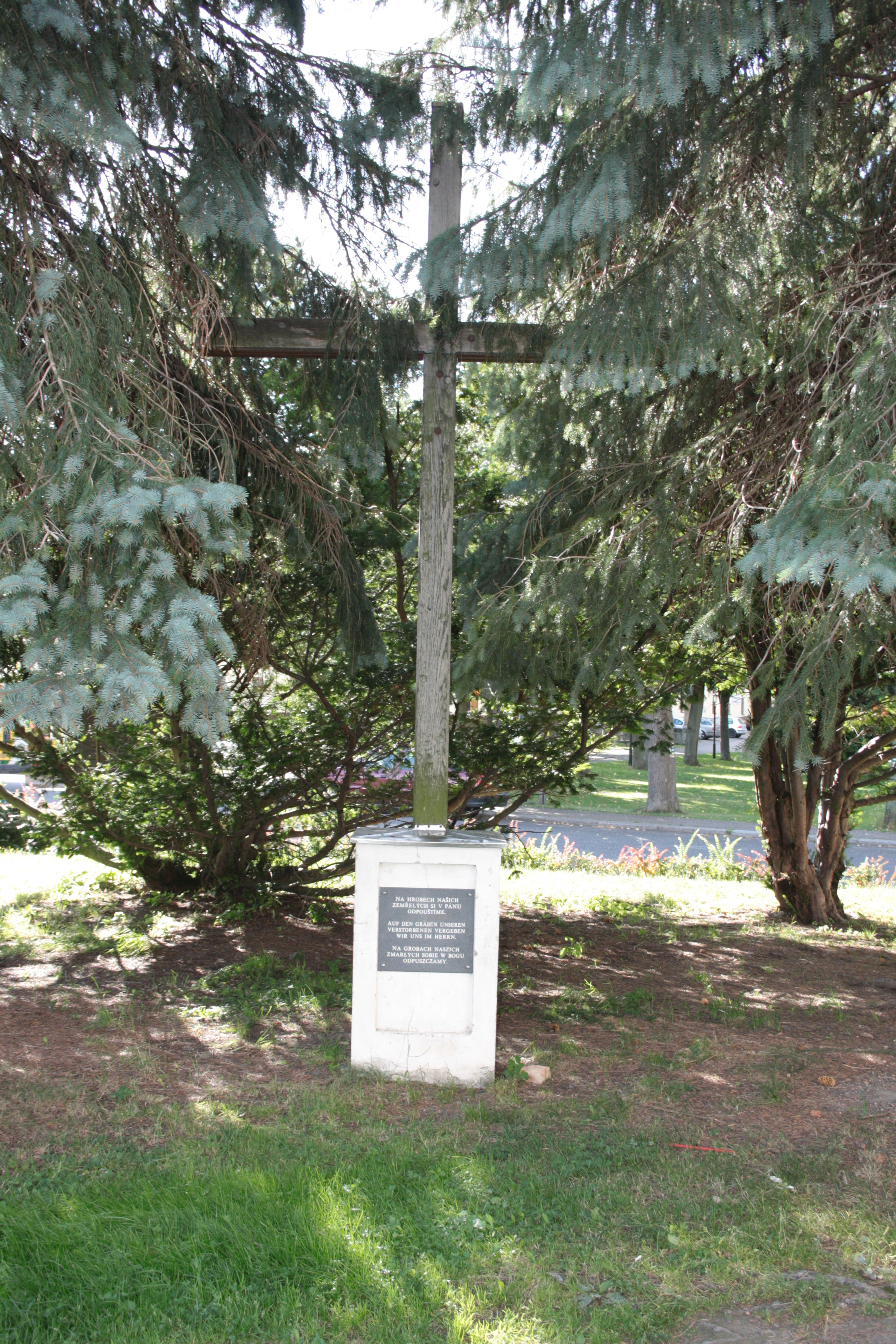 This photograph was taken with a DSLR from WMCZ's Camera grant. Křižek na pamšť vzájemného odpuštění umístěný v Hejnicích v okrese Liberec.